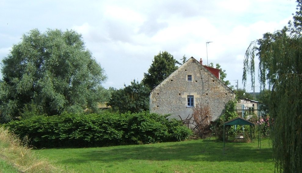 Moulin de Taizon situé sur le Thouet à l'entrée Est du Village